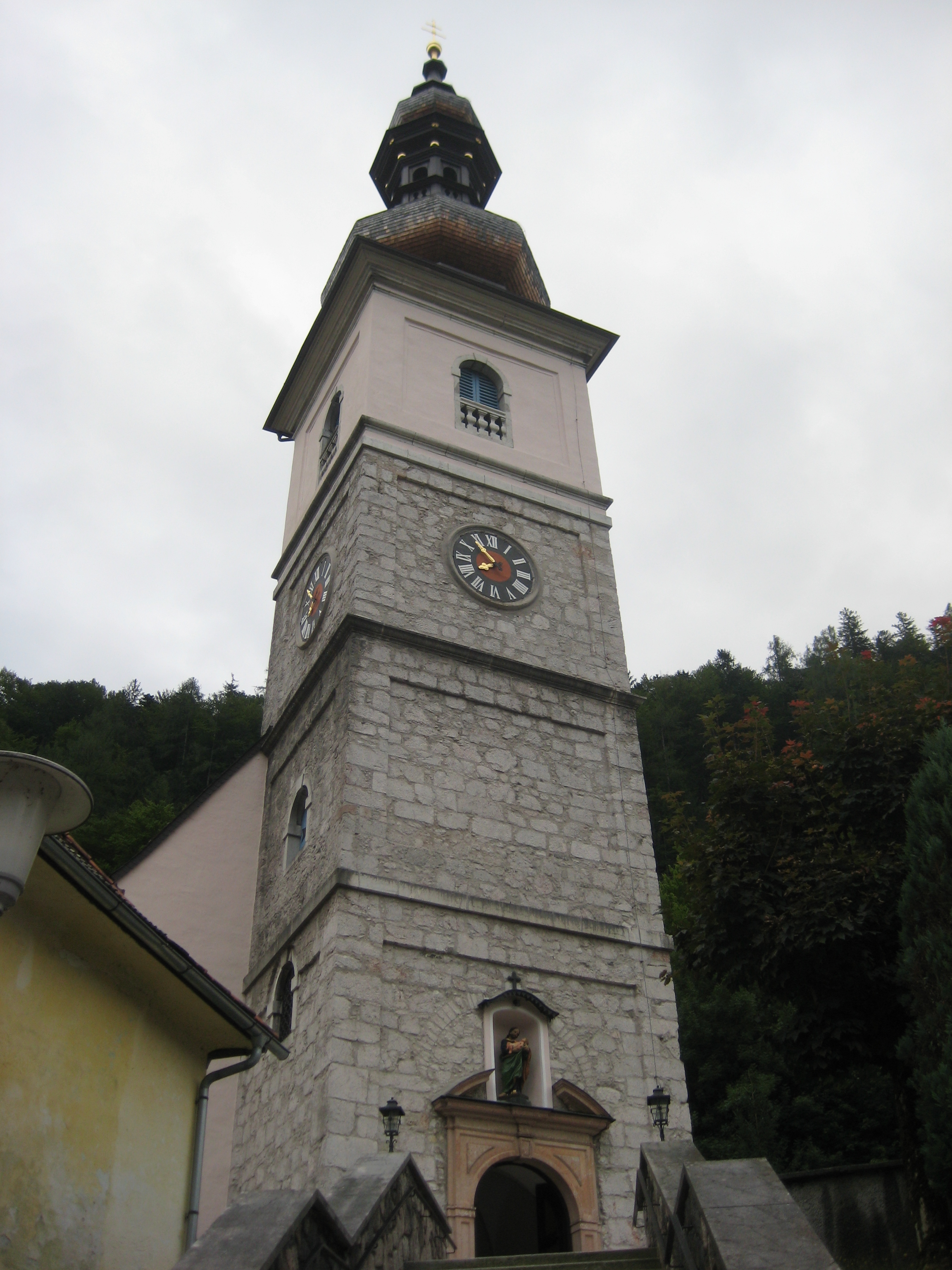 Kath. Pfarrkirche, Wallfahrtskirche Mariä Himmelfahrt mit Kirchhof